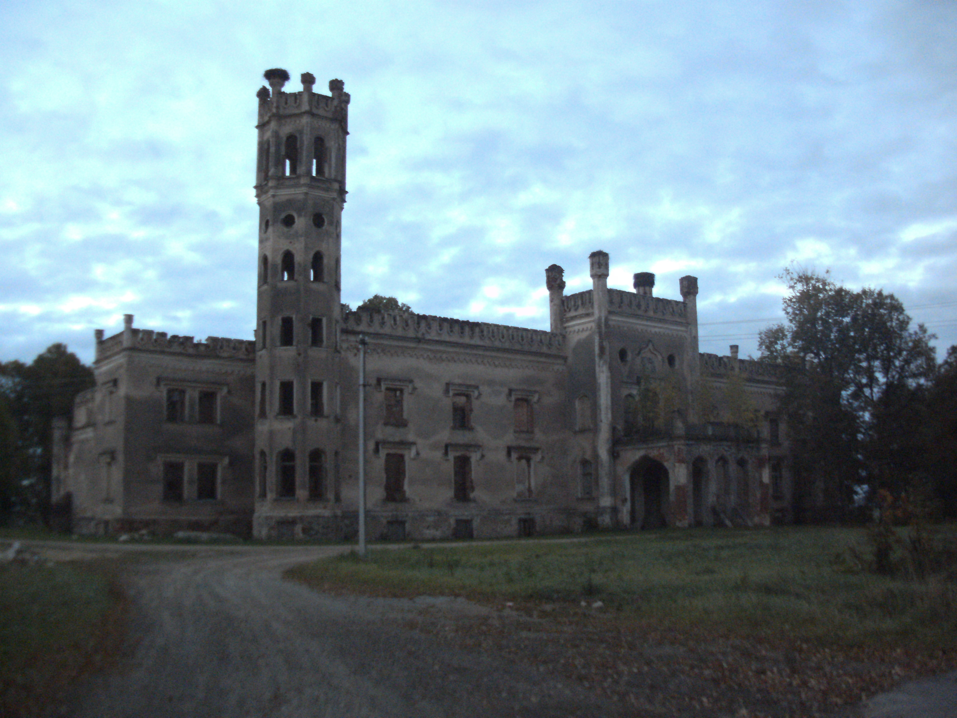 Ruine des Herrenhauses in Odziena, Lettland